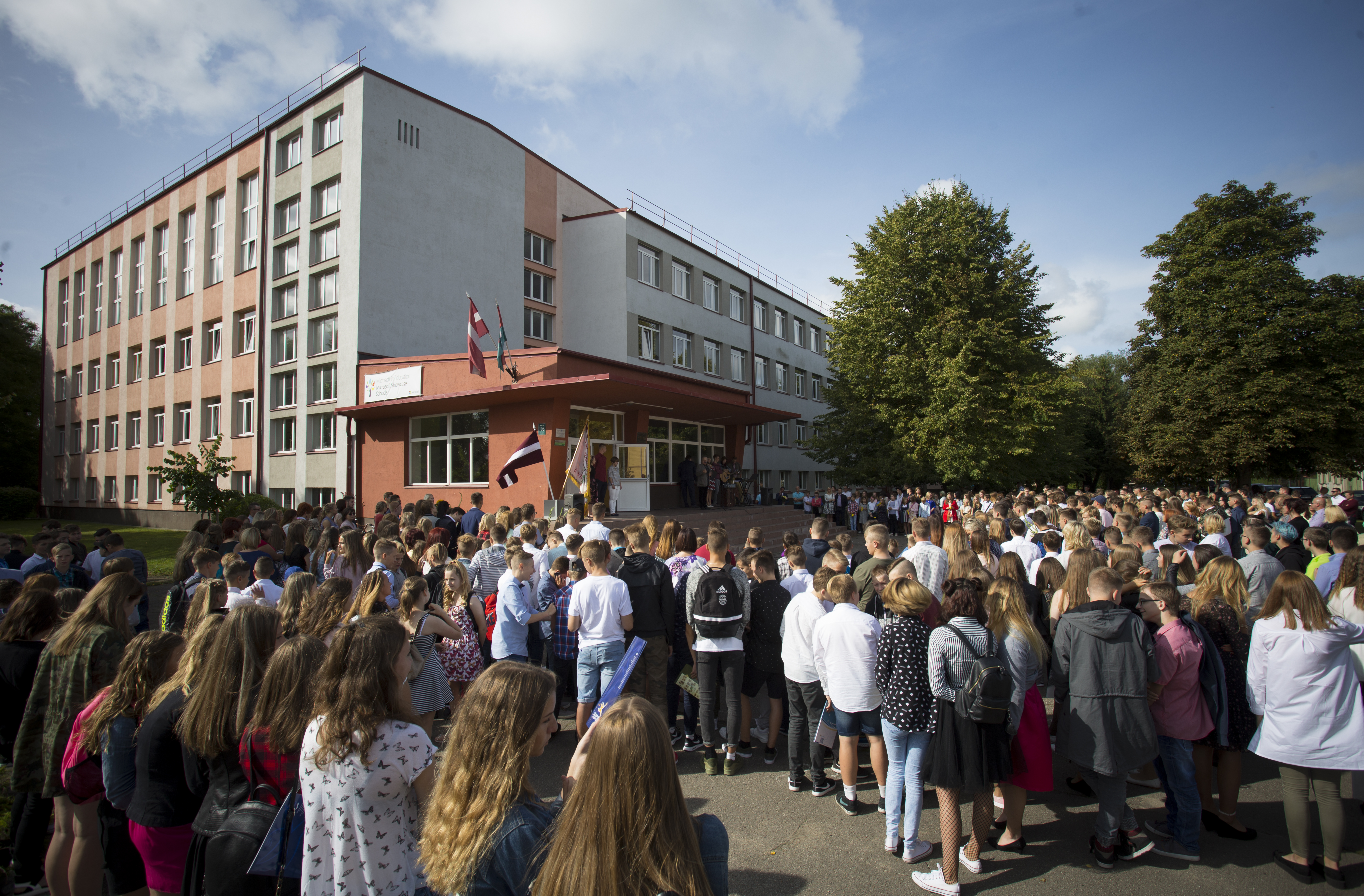 2017. gada 1. septembris Liepājas Raiņa 6. vidusskolā.